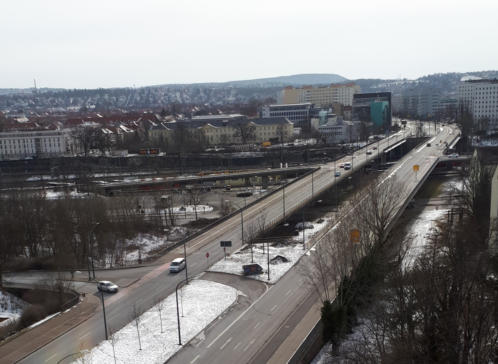 Blick auf die Brücke Budapester Straße vom 12.Stock der Josephinenstraße 4, Dresden